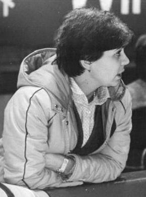 Irina Rodnina, Ludmilla Koblewa, Andrej Kalitin ADN-ZB Thieme 26.11.82 Karl-Marx-Stadt: "Pokal der Blauen Schwerter" im Eiskunstlaufen - Irina Rodnina betreut Nachwuchspaar- Von der erfolgreichsten Eiskunstläuferin aller Zeiten, Irina Rodnina (l.), wird das talentierte Moskauer Nachwuchspaar Ludmilla Koblewa - Andrej Kalitin betreut. Die Schützlinge der mehrfachen Weltmeisterin und Olympiasiegerin belegten in der Entscheidung der Paare am 25.11.82 mit 4,2 Punkten den dritten Rang.